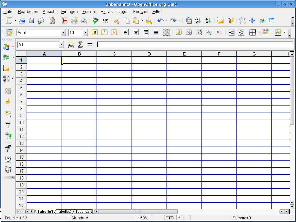 2.0 Calc (Linux, KDE, German)